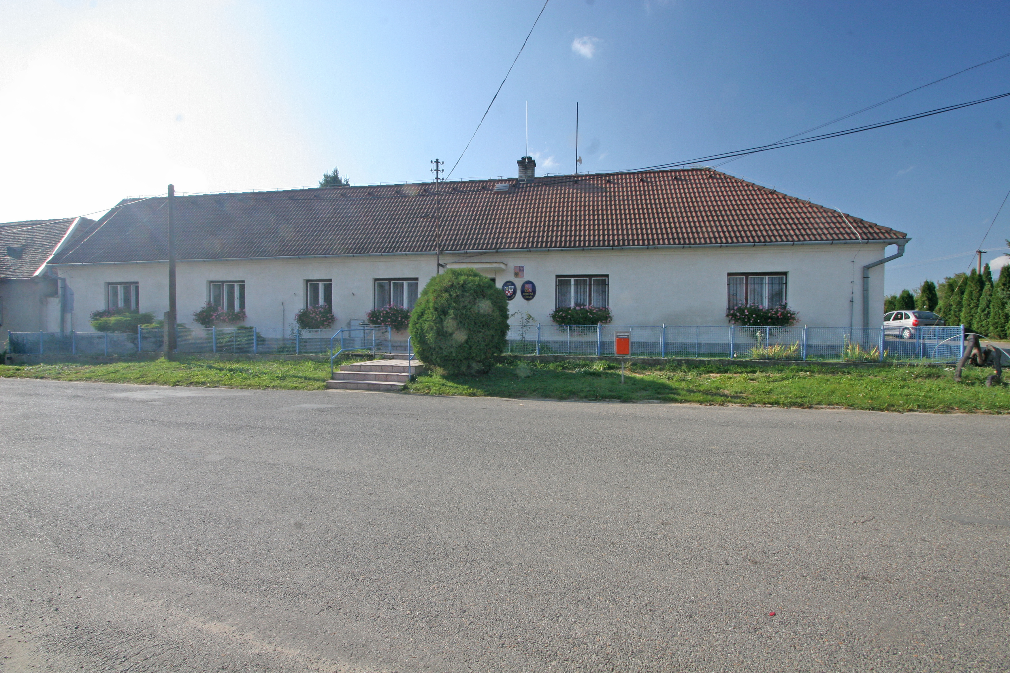 Starý Petřín obecní úřad